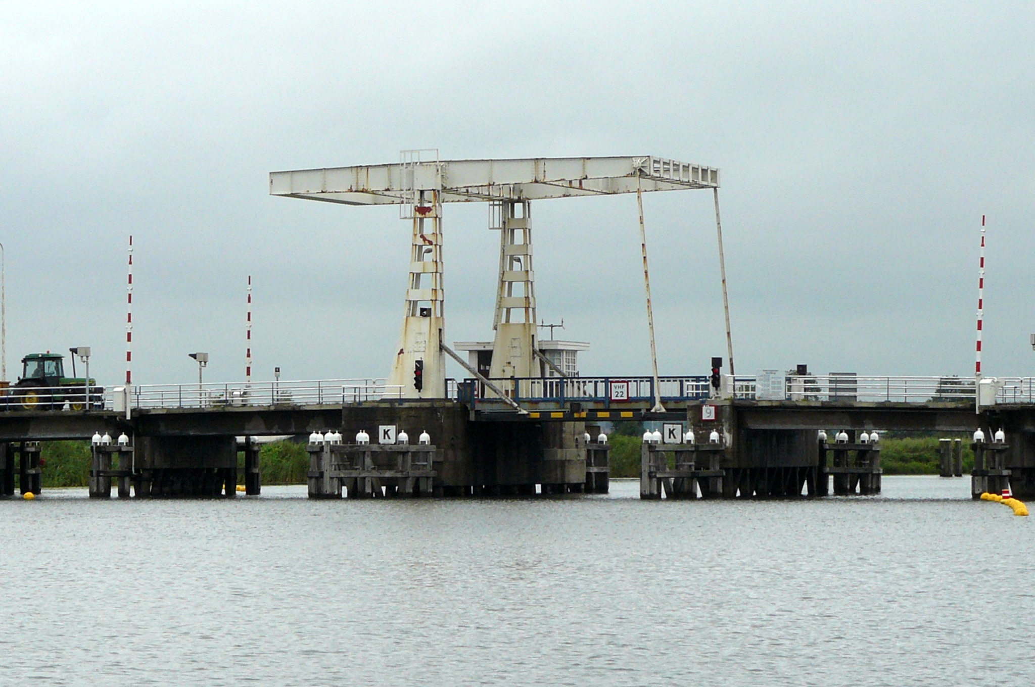 De brug over de Vecht, nabij Fort Uitermeer, onderdeel van de provinciale weg N236.